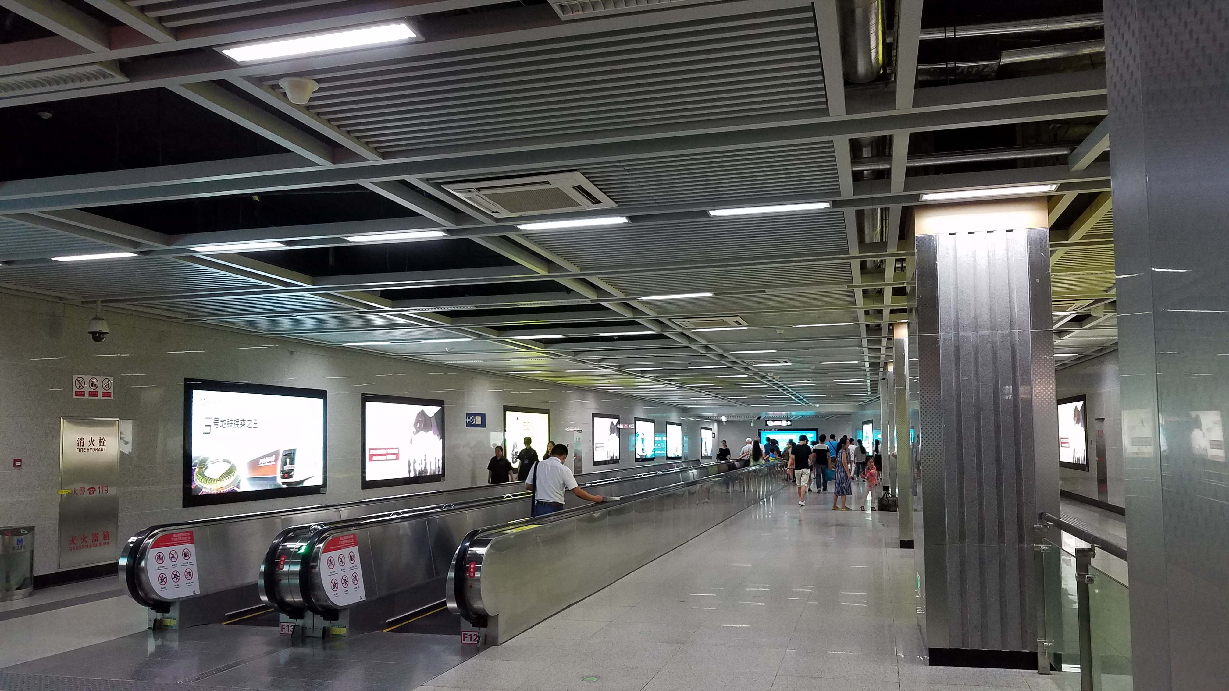 范湖站换乘通道往2号线方向。